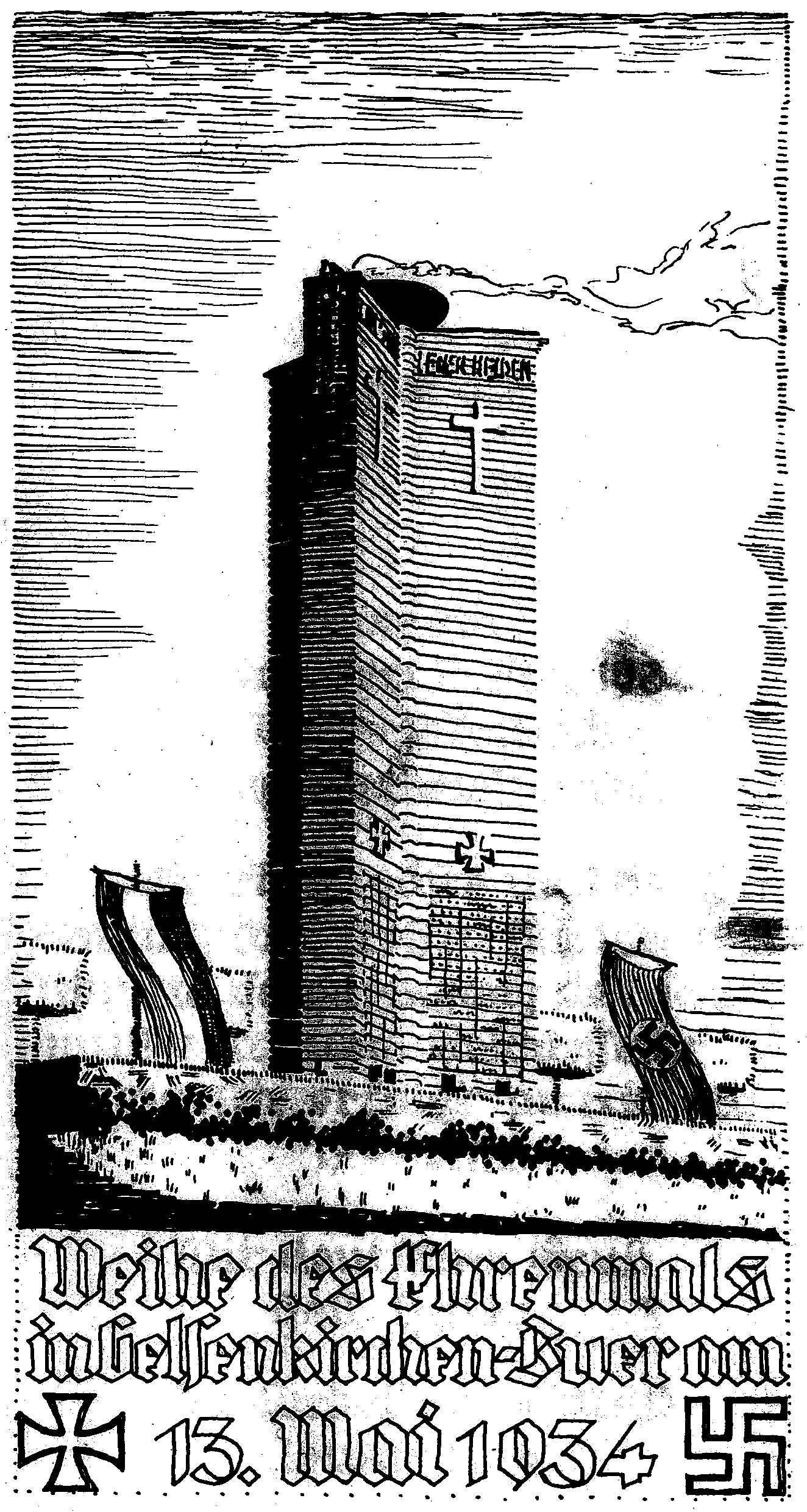 Titelseite des Programmhefts zur Eröffnung des Ehrenmals in Gelsenkirchen-Buer am 13.05.1934